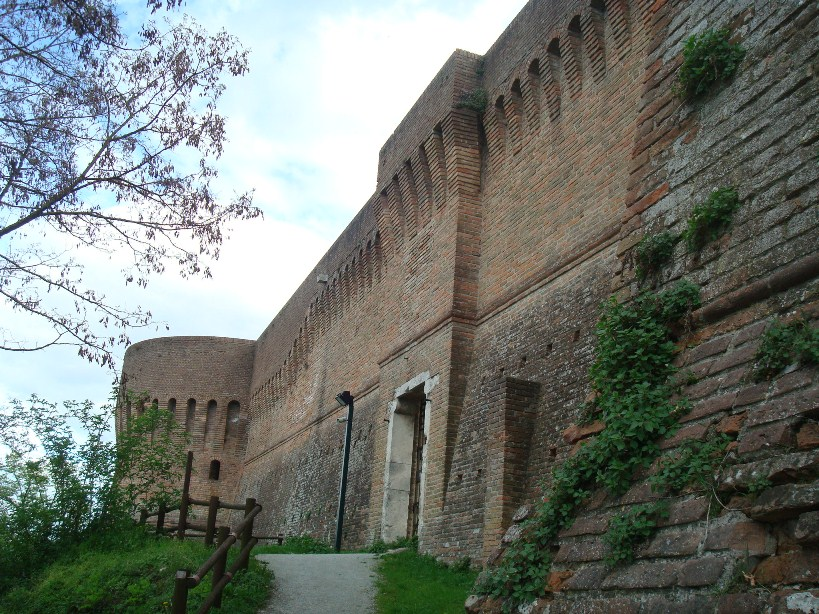 Cesena (Italie), Rocca Malatestiana, antique porte d'entrée de la forteresse.